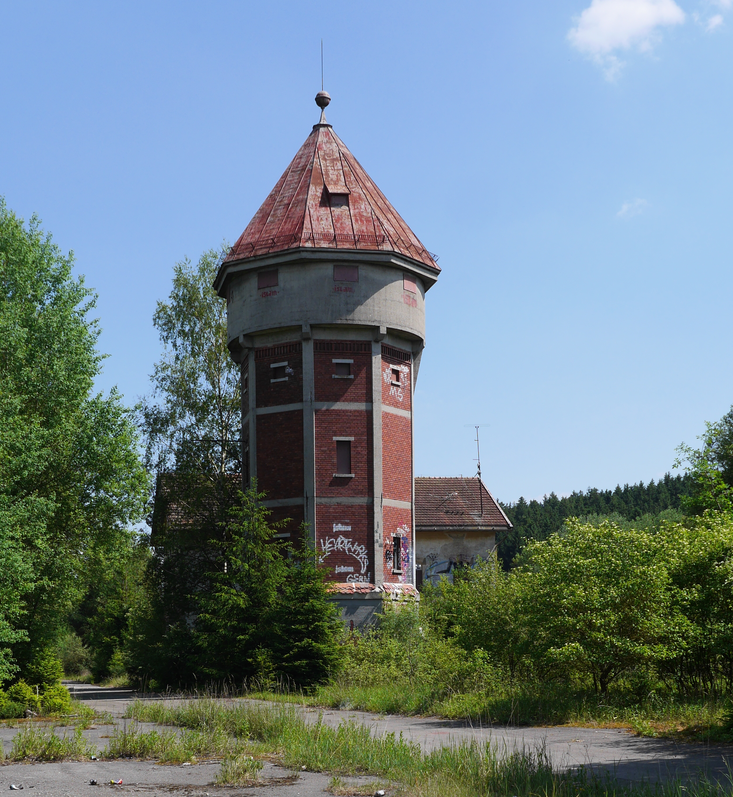 Denkmalgeschützter Wasserturm (Roter Turm) des Schwellenwerks Kirchseeon von 1902/03, von der Nordseite This is a photograph of an architectural monument.